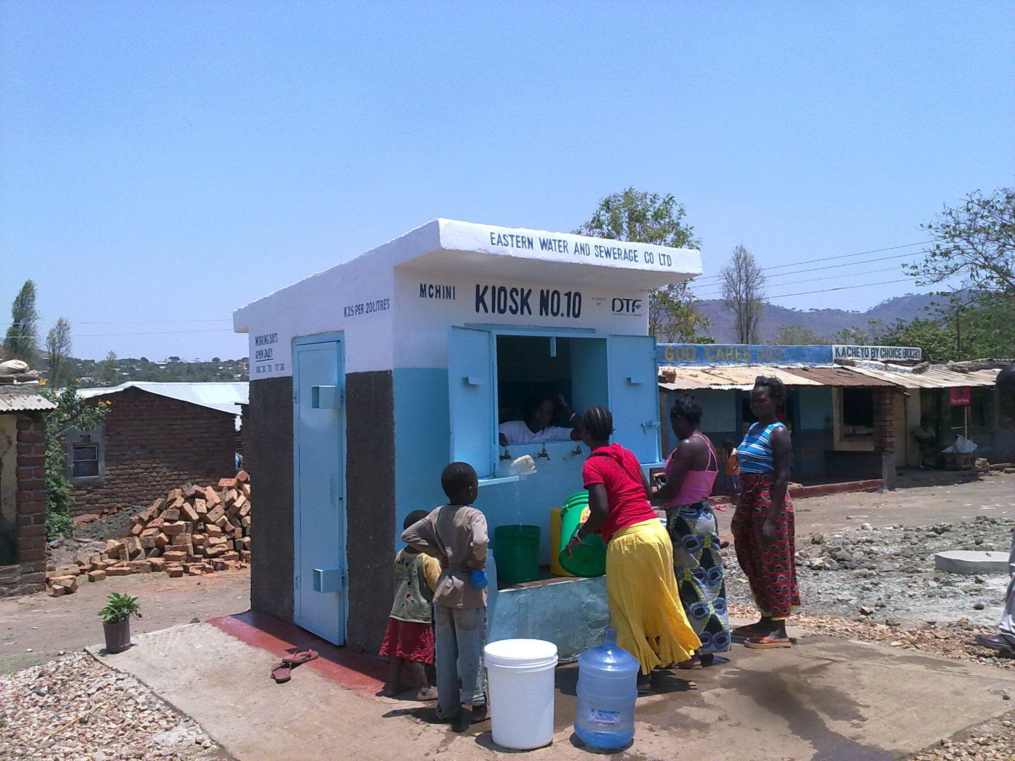 Photos: © GIZ Rahul Ingle, 2010